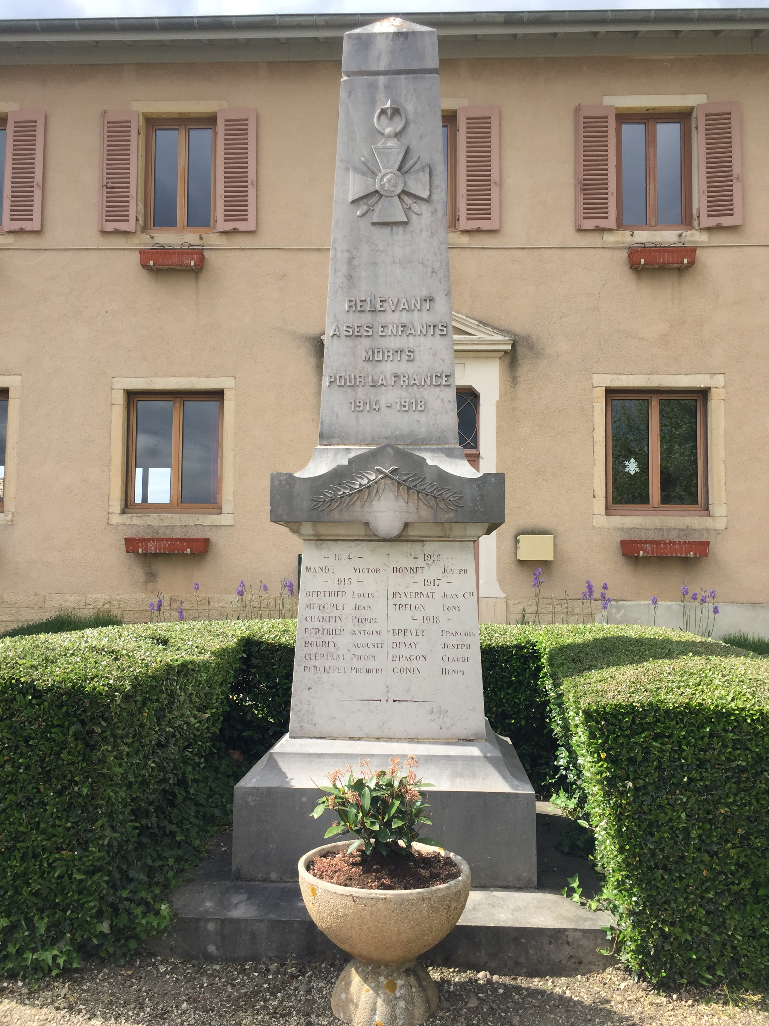 Image du village de Relevant, dans l'Ain, en France..